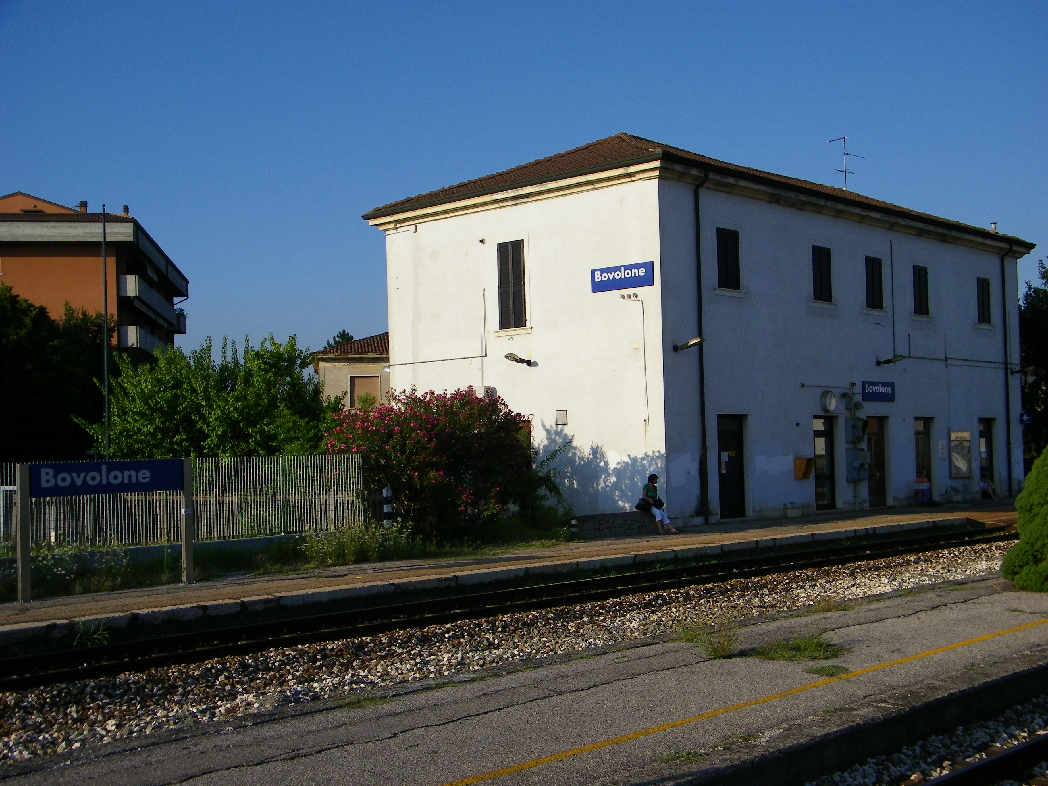 Veduta della Stazione di Bovolone lato binari